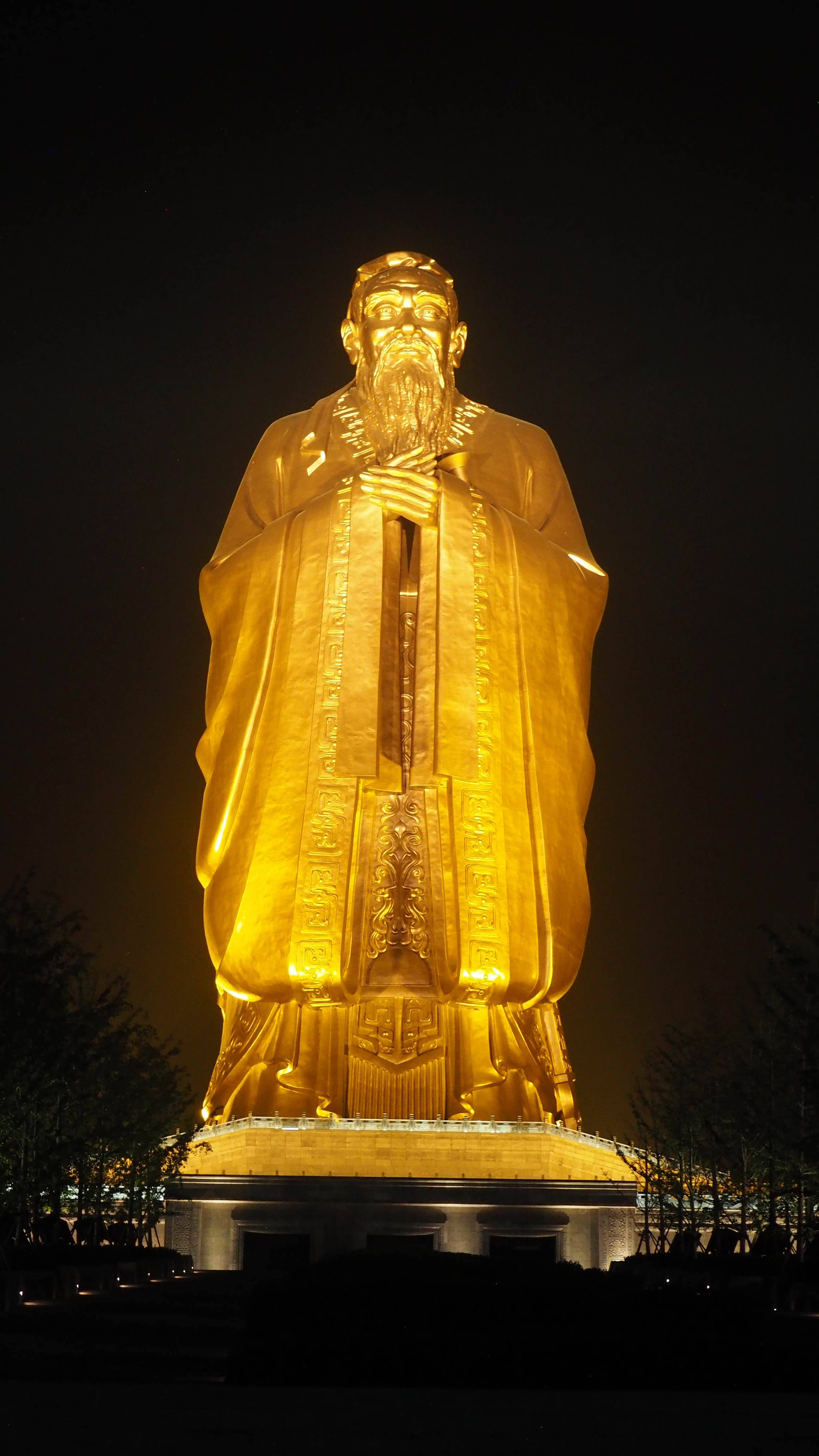 Bild der Konfuzius Statue